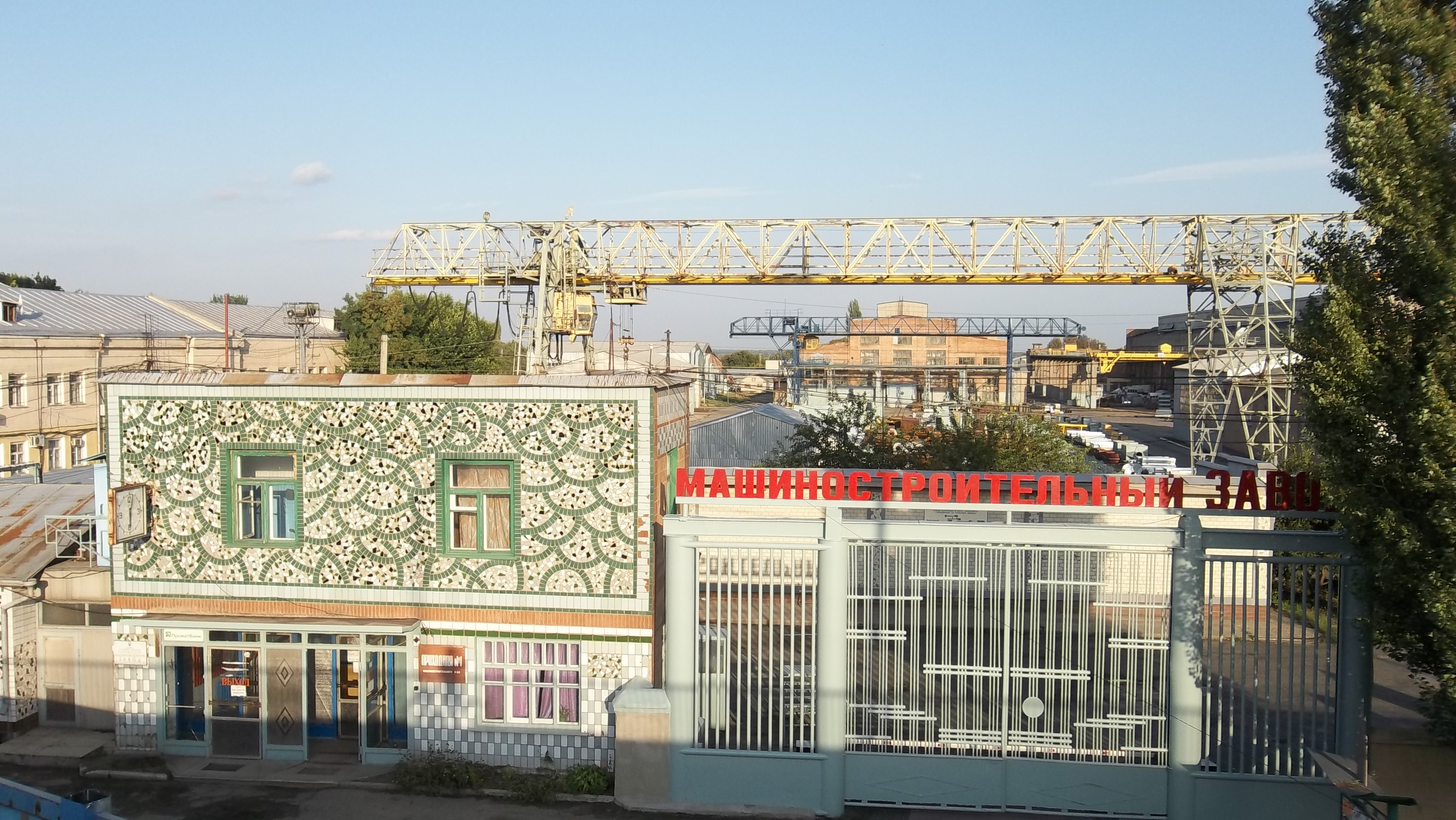 Проходная машбуд